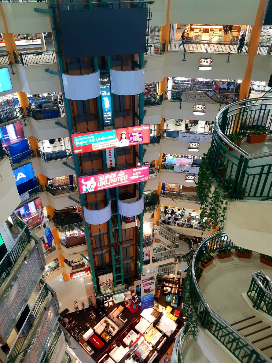 Tampak dalam dari ITC Cempaka Mas